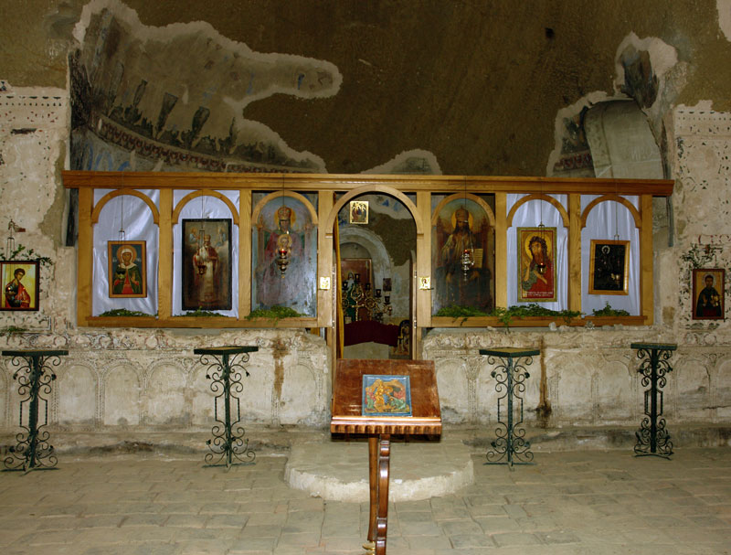 Natlismtsemeli Monastery Georgia